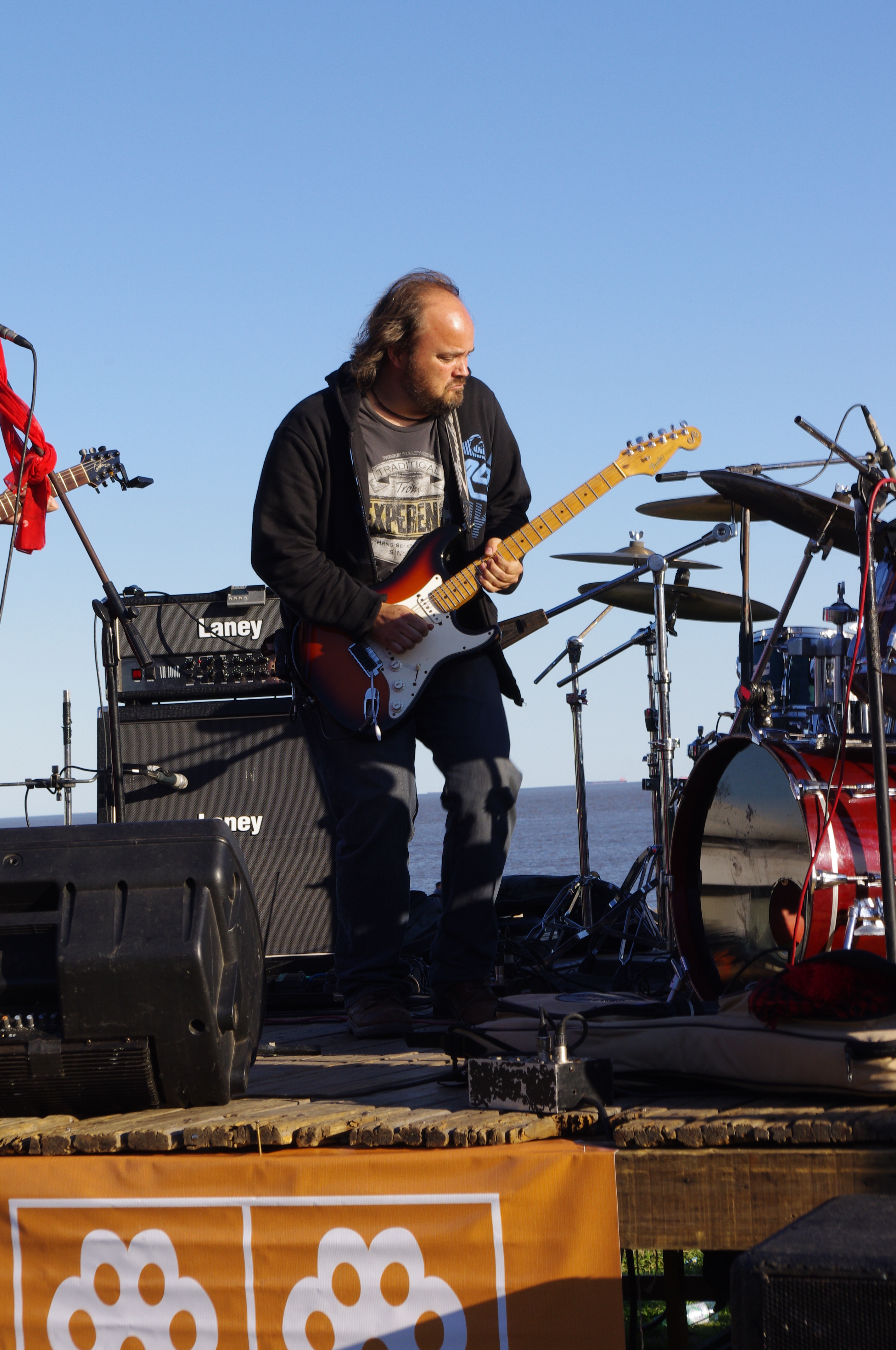 Fotografía del guitarrista y cantante Christian Cary, integrante del grupo de rock uruguayo La Triple Nelson. Tomada en el espectáculo artístico con el que finalizó la actividad por los derechos de los animales organizada por "Animales sin hogar".